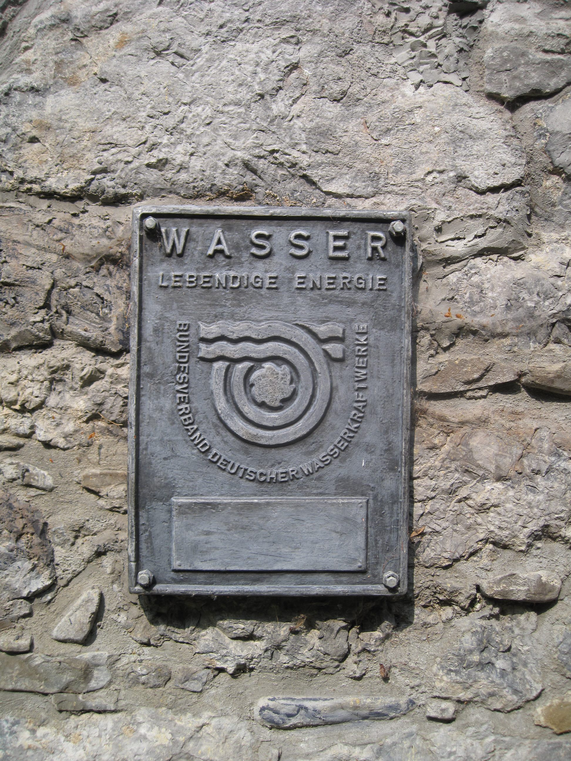 Tafel „Wasser, lebendige Energie“ des Bundesverbandes deutscher Wasserkraftwerke (BDW) an der denkmalgeschützten Mühlenanlage Klusenstein im Hönnetal in Balve.